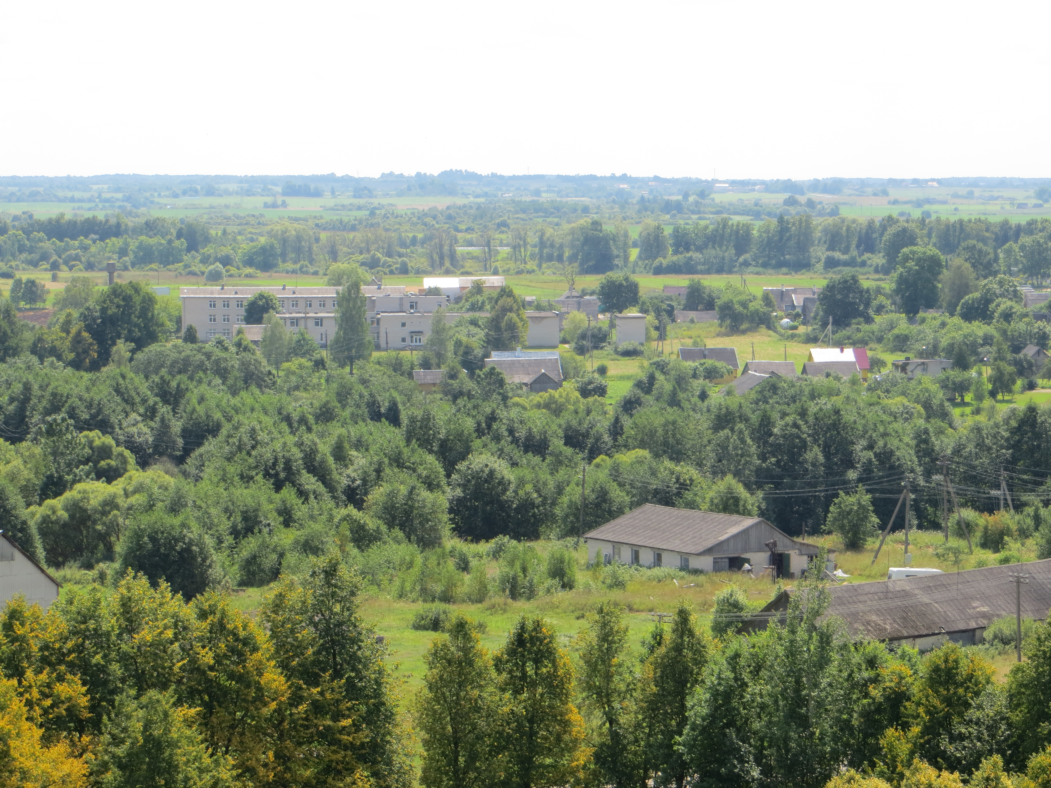 Adutiškio sen., Lithuania